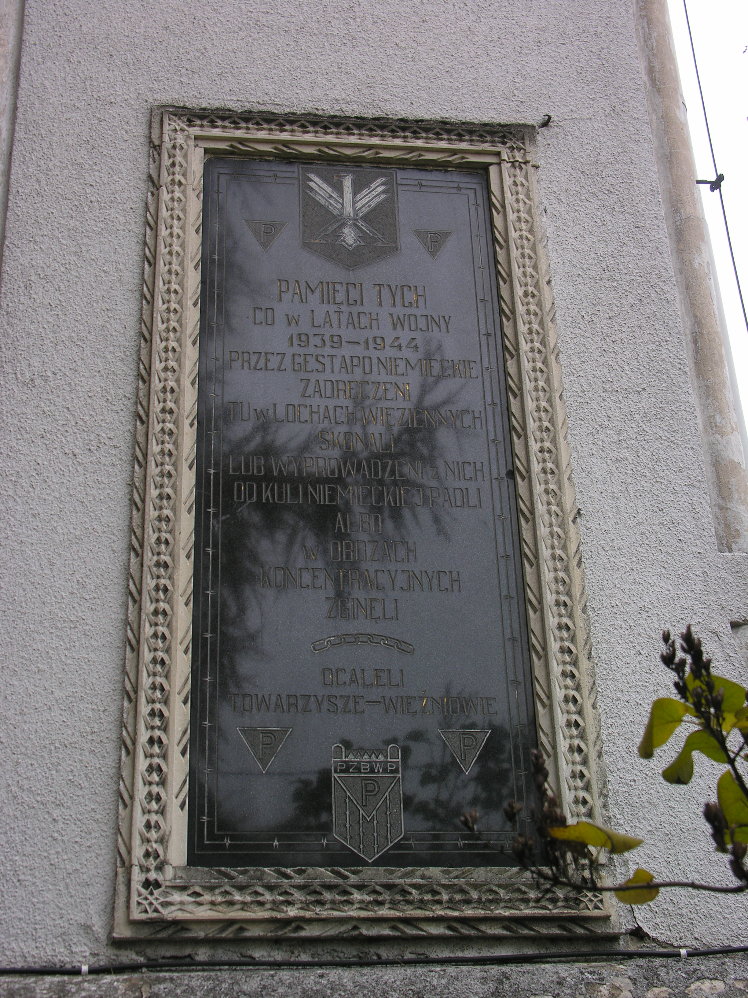 Tablica pamiątkowa na siedzibie gestapo w Jaśle (obecnie szpital), ul. Za Bursą 1